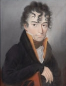 Porträt of a young gentleman by Friedrich Christian Krieger (Krüger)